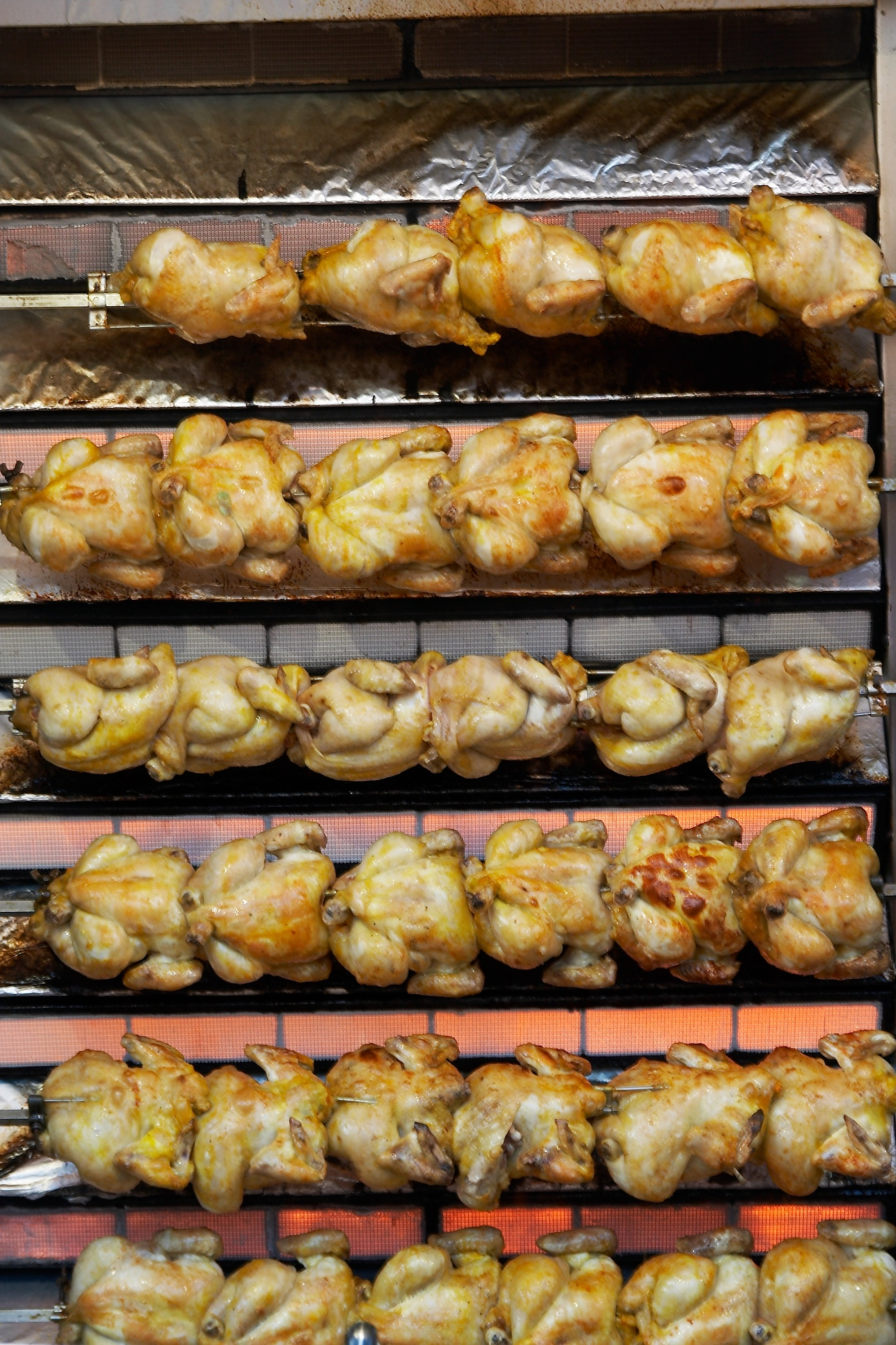 Pollo rostizado. Fiestas de San Isidro 2007, Madrid, España.